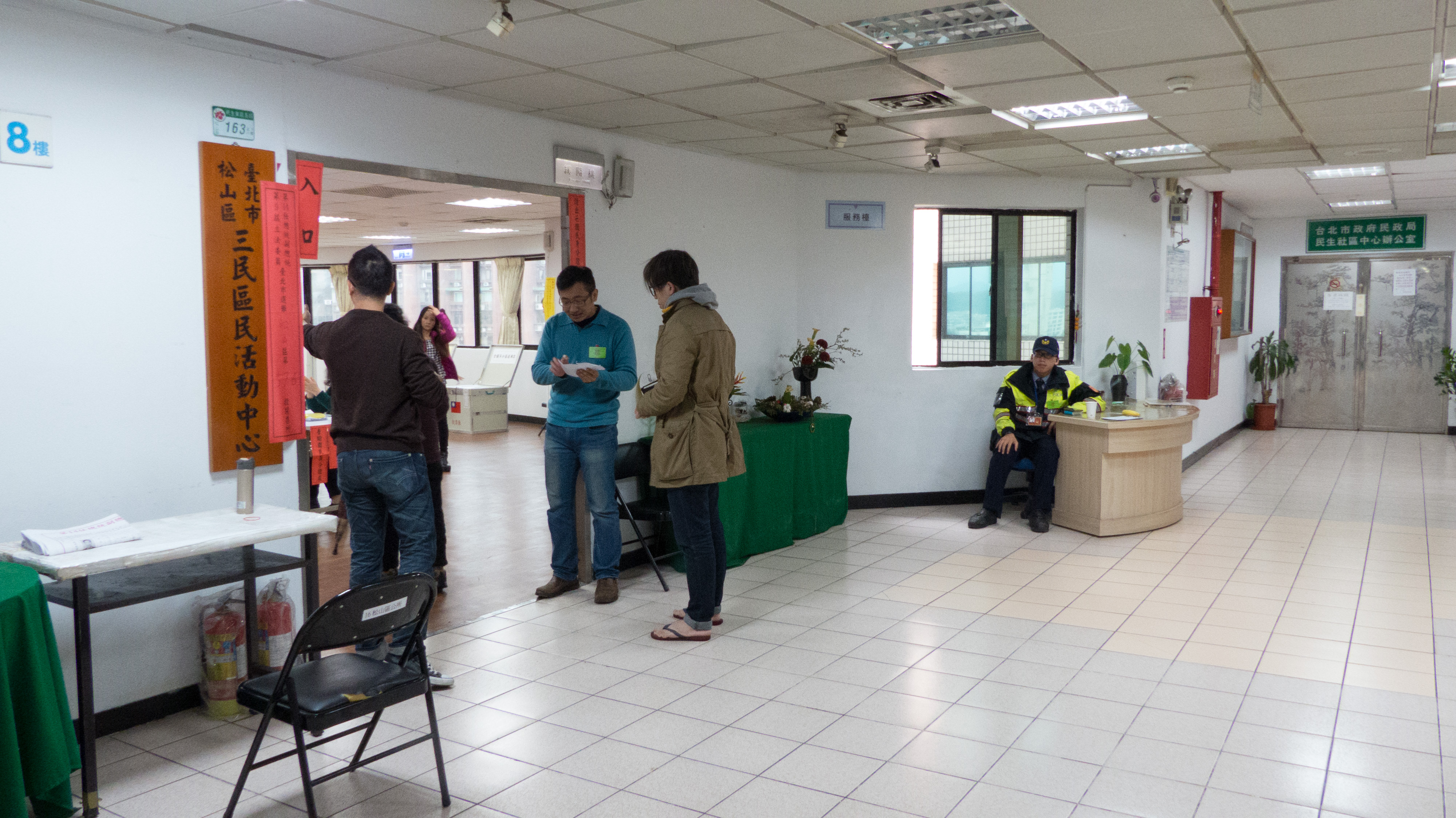 2016年中華民國第十四任正副總統選舉投票日下午，民生社區活動中心八樓的臺北市松山區576投票所（臺北市松山區三民區民活動中心）。